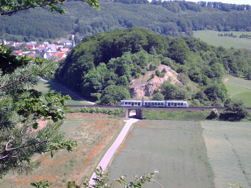 Beschreibung: RegioTram-Zug bei Ostheim; Blick vom Wacholderberg im Naturschutzgebiet Schwiemelkopf Quelle: selbst fotografiert und bearbeitet